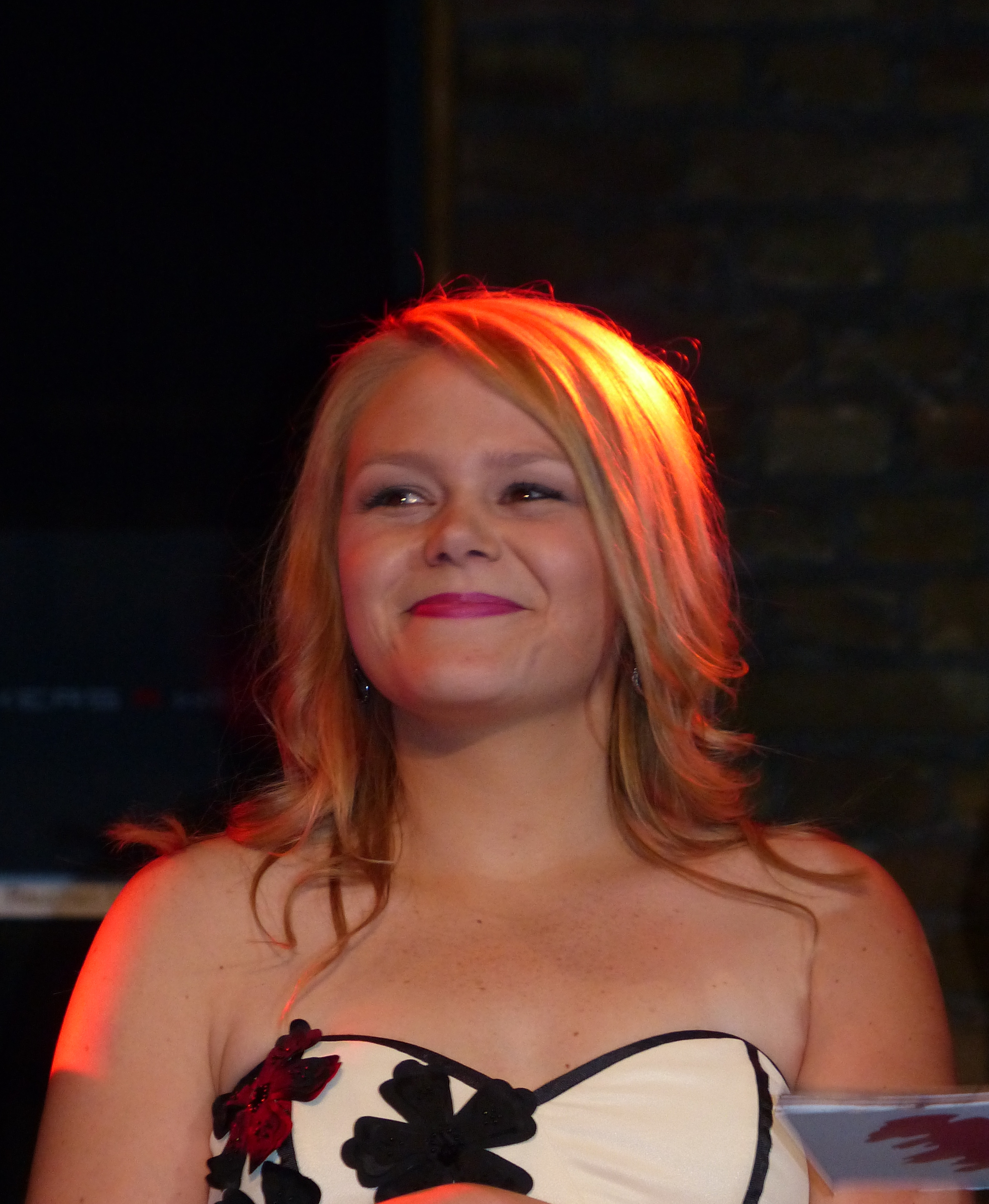 Julia Sontag, 18. Jahre Verbotene Liebe Party, Düsseldorf